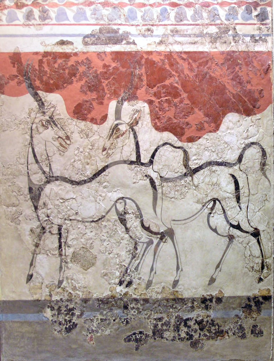 Fresque des Antilopes. Les deux antilopes sont dessinées à l'aide de lignes foncées appuyées sur un fond de plâtre blanc. Leurs figures sont simples et leurs mouvements expressifs. La fresque appartenait à la même pièce que celle des boxeurs, et peut-être à une composition plus complexe mêlant des figures humaines et animales. Pièce B1, édifice B à Akrotiri.